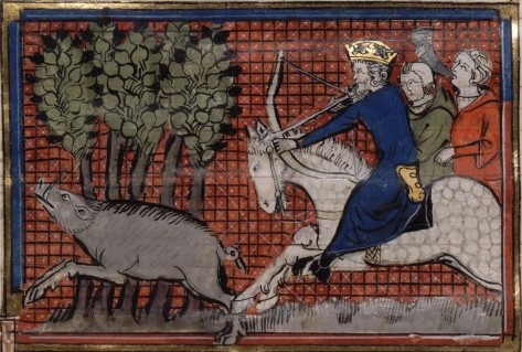 Jean II Comnène chassant